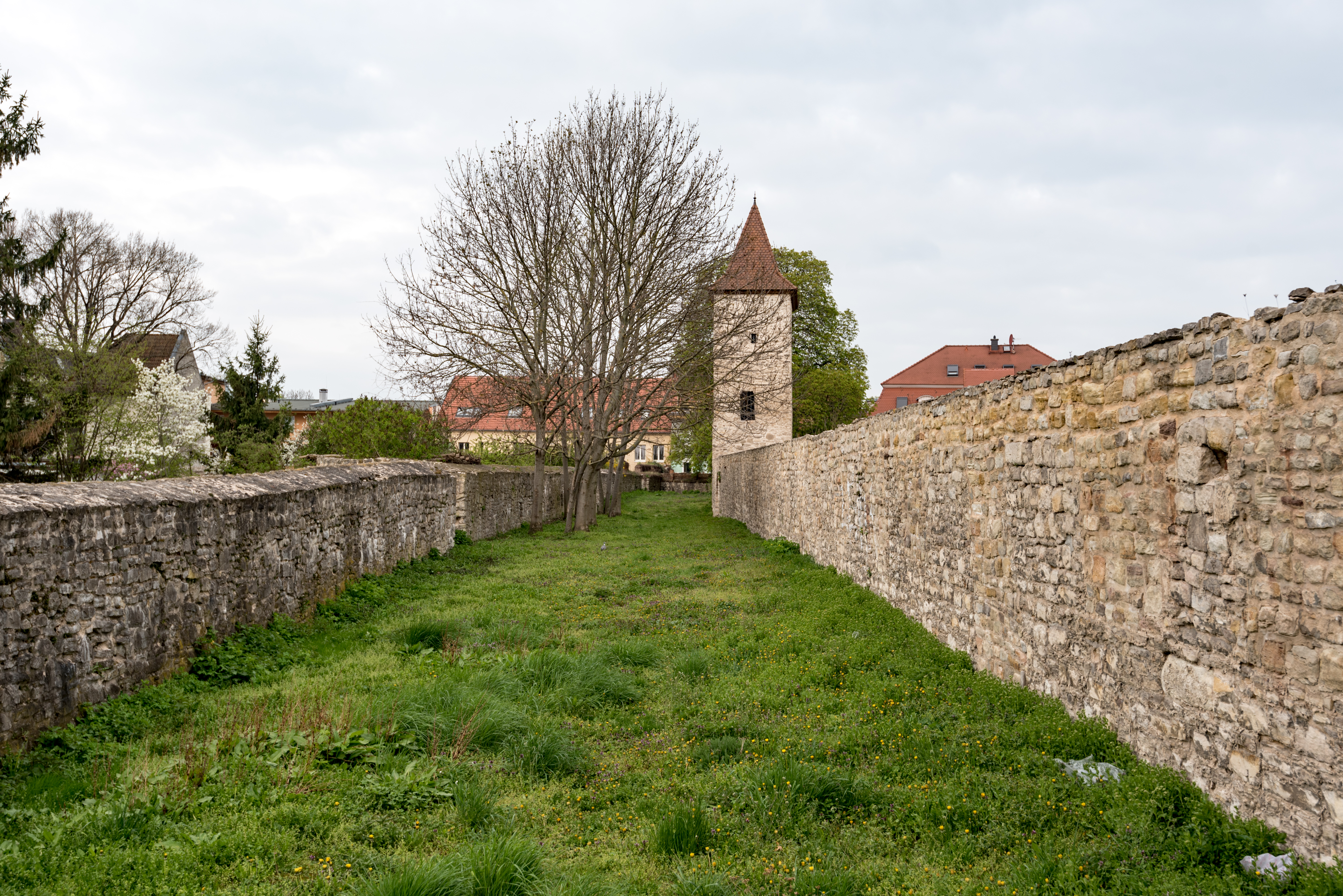 Staßfurt, Stadtmauer